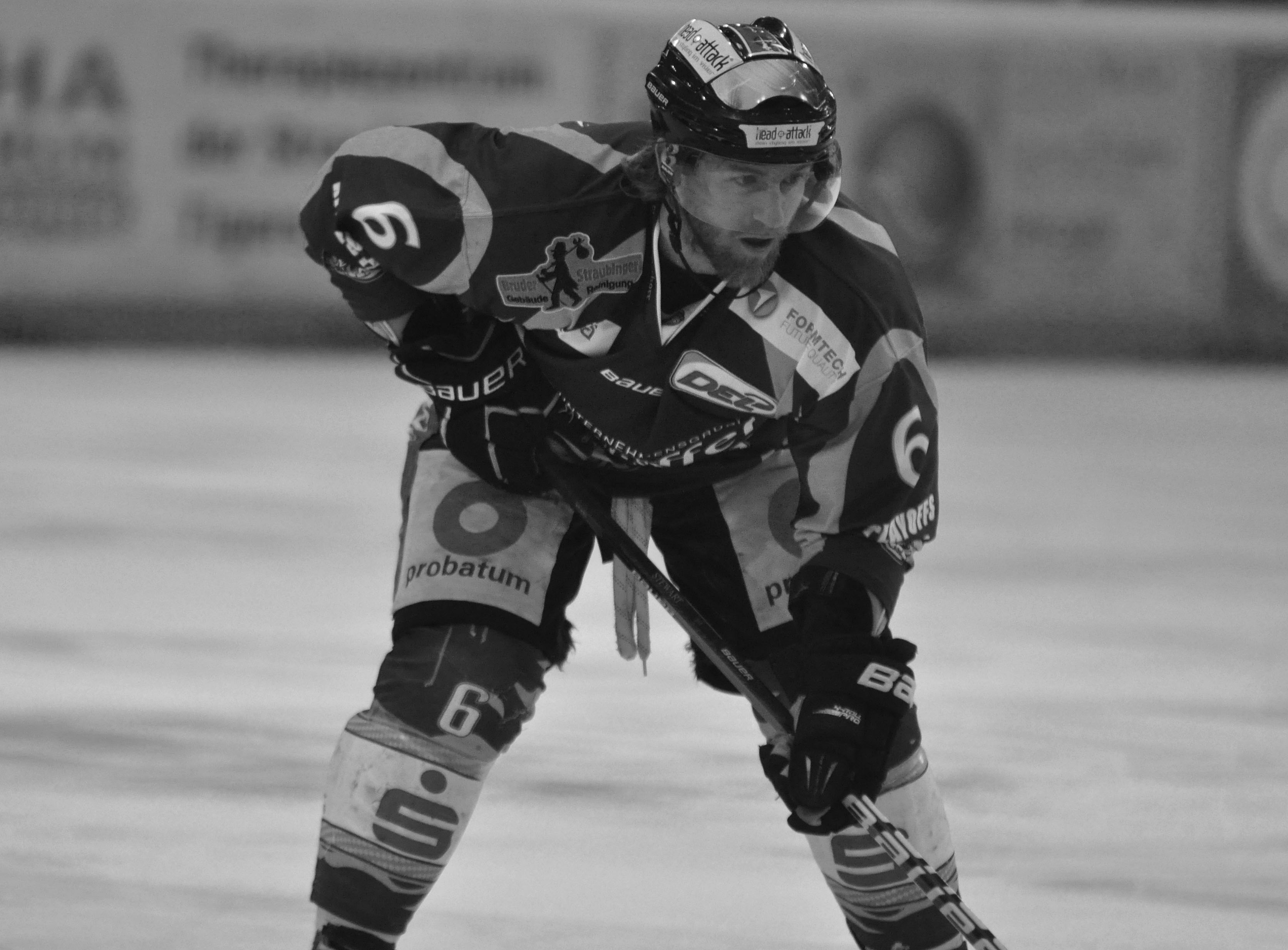 Straubing Tigers - Eisbären Berlin 11.04.2012 DEL PlayOff Halbfinale